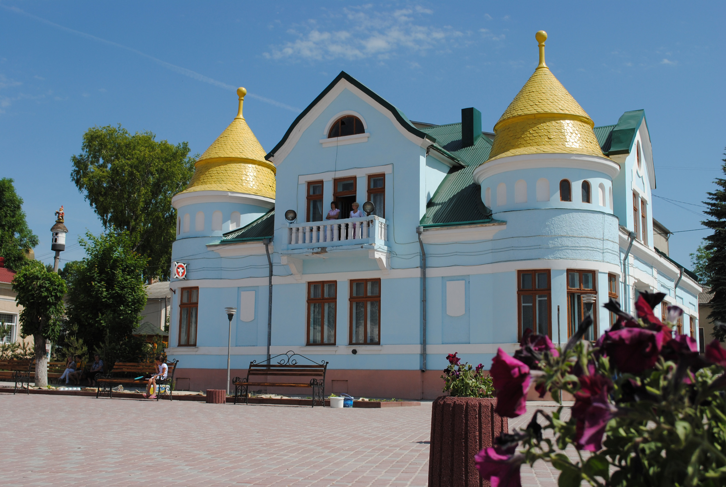 Житловий будинок (мурований) у Підволочиську (вул. Д. Галицького, 37) Тернопільської області. Вілла Громницького.